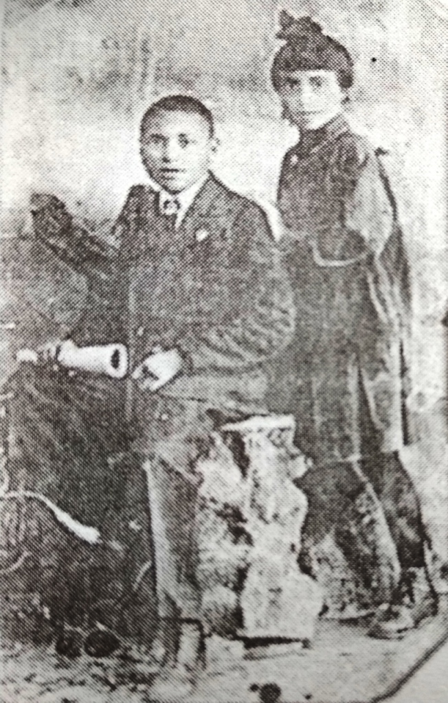 Петро та Неля (Наталія) Біленькі